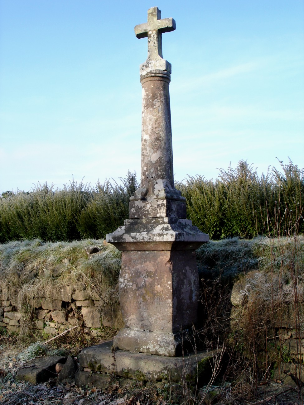 croix de chemin en grès rose rue du Charmois - Raon-L'Étape 88372